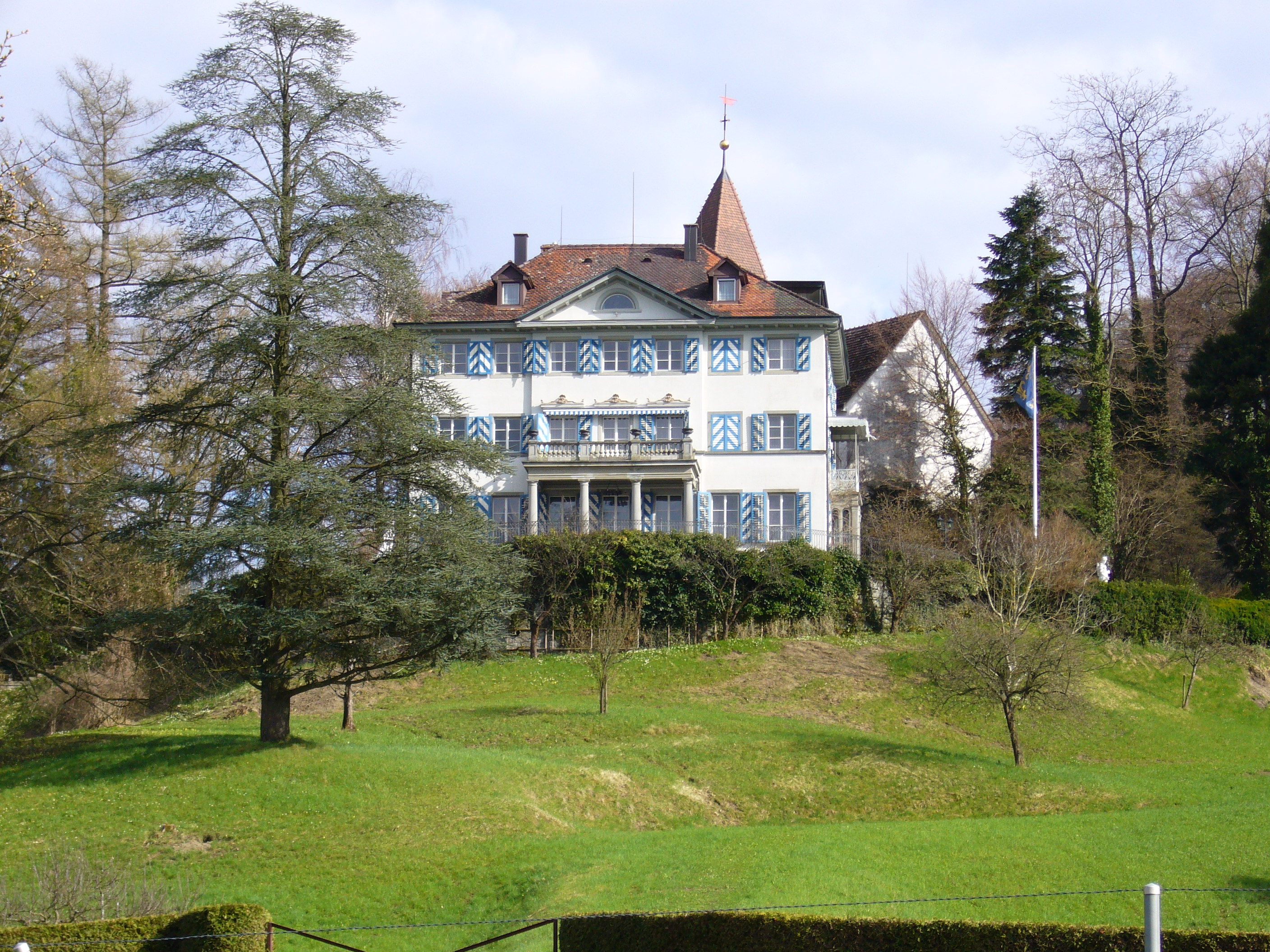 Aufnahme von Schloss Louisenberg in Mannenbach TG, vom 28. März 2005